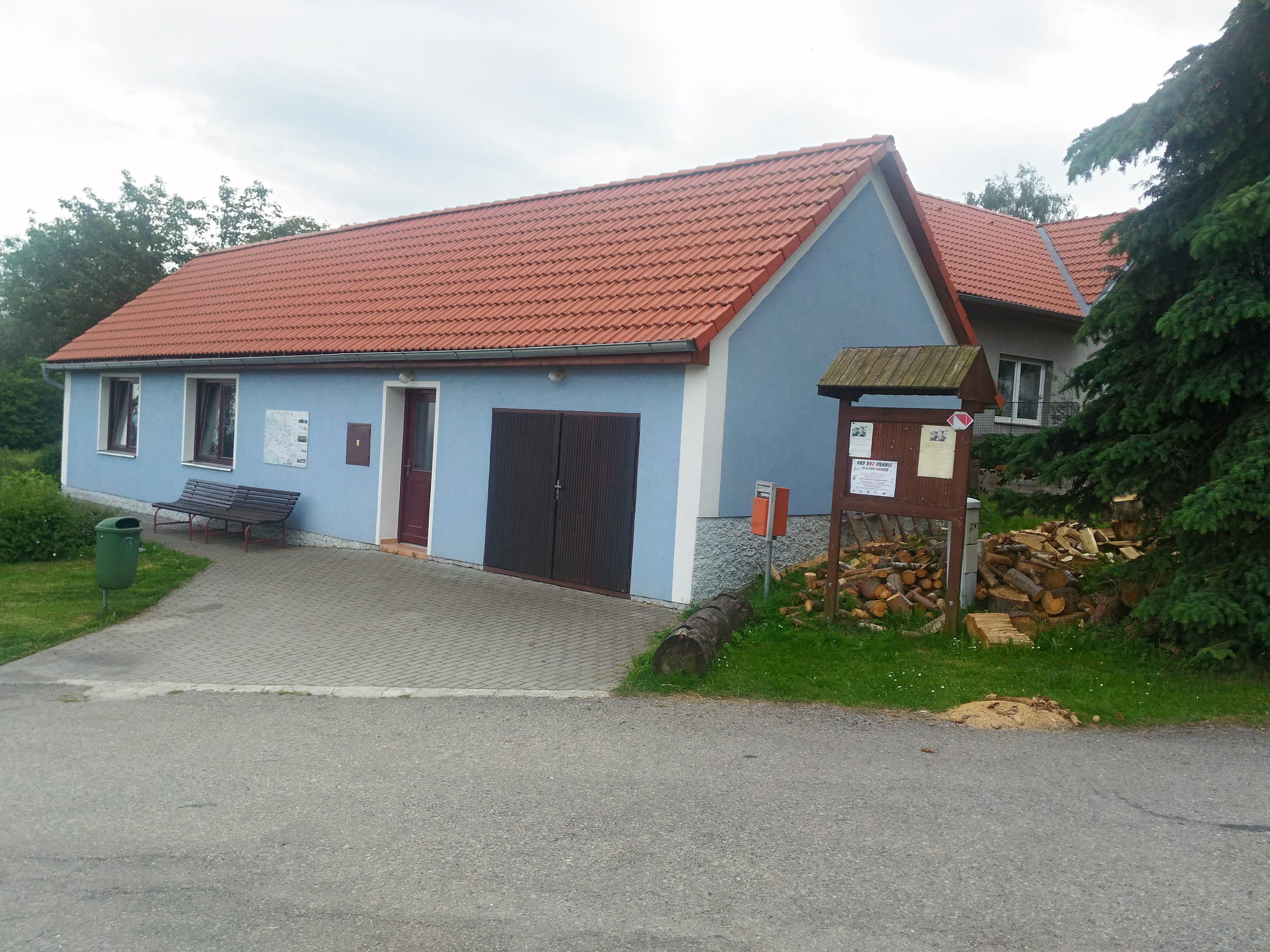 Pikov, okres Tábor, Česká republika